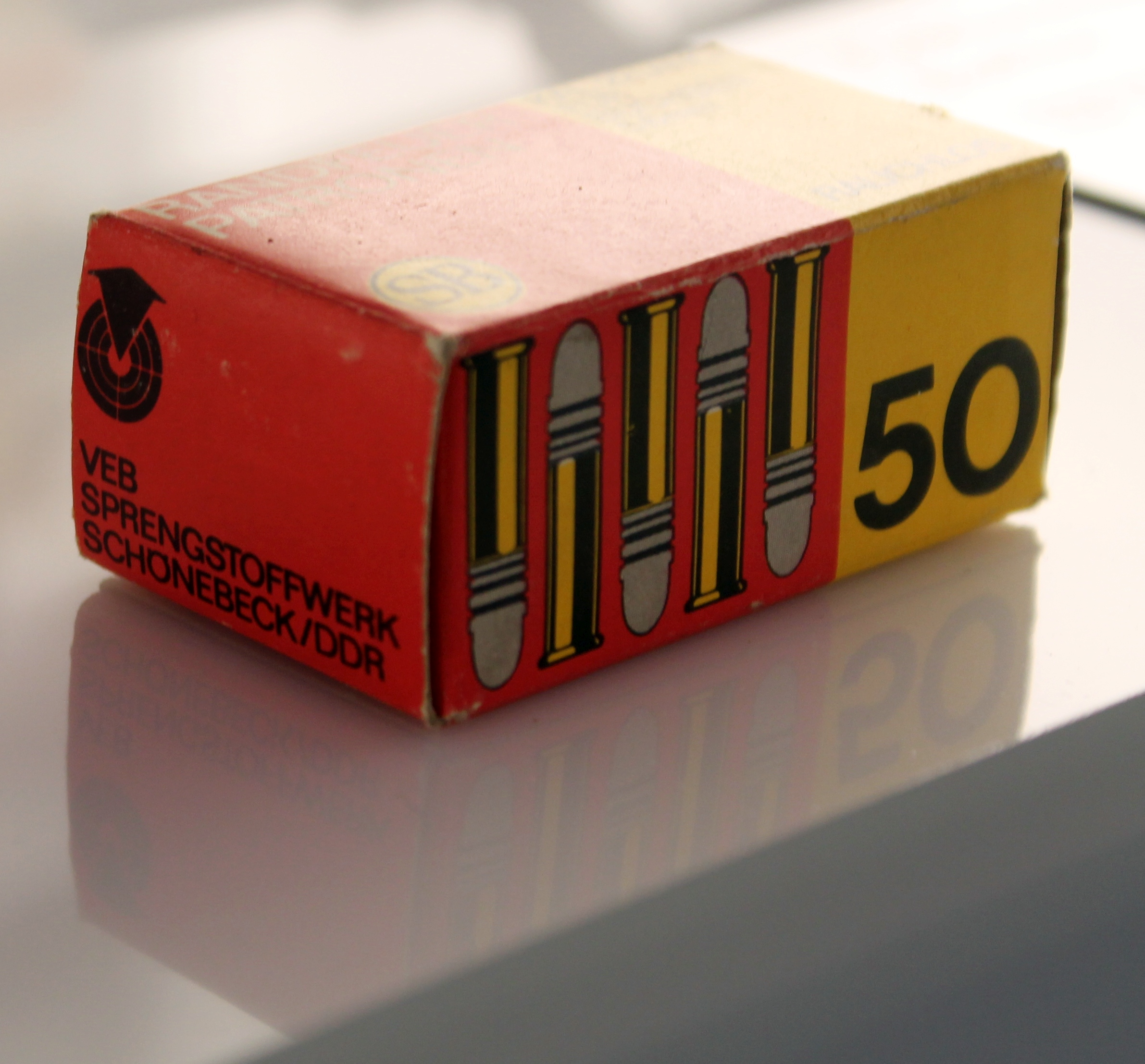 Kleinkaliberpatronen .22lfB (5,6 x 15,5 mm R) im Waffenmuseum Suhl. Packung mit 50 Stück, VEB Sprengstoffwerk Schönebeck/Elbe.